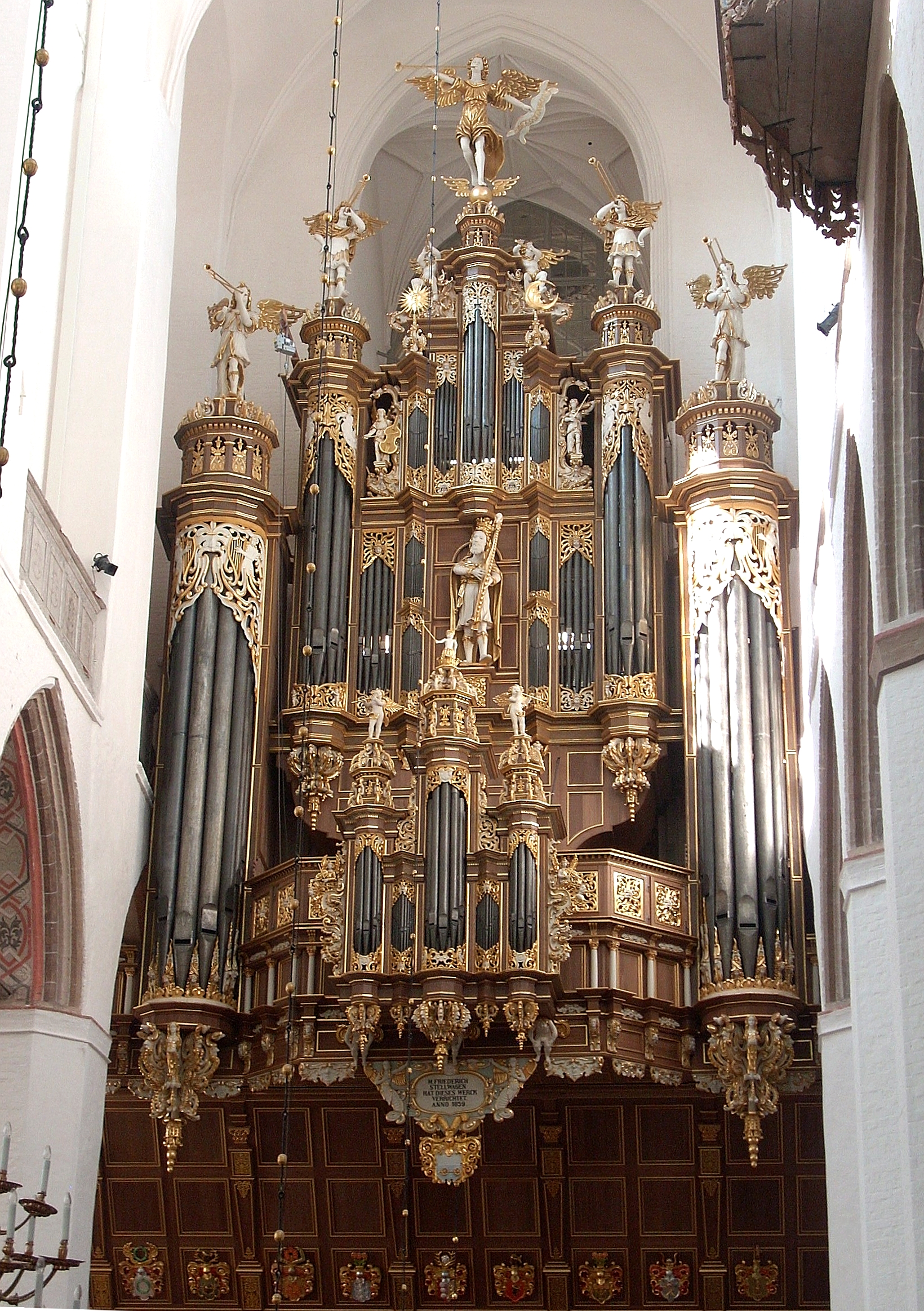 St. Marien, Stralsund, Organ